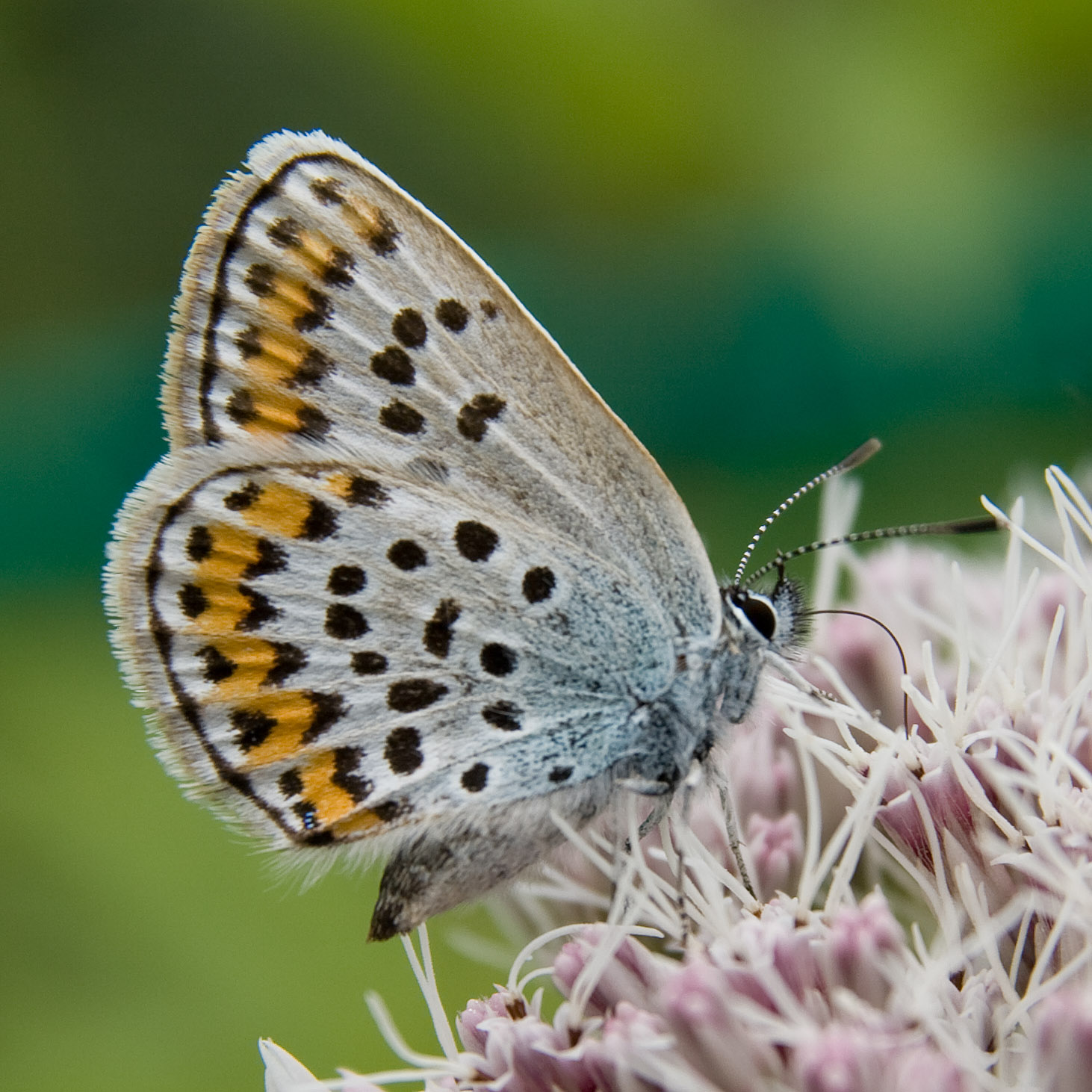 アサマシジミ (学名:Lycaeides subsolanus )